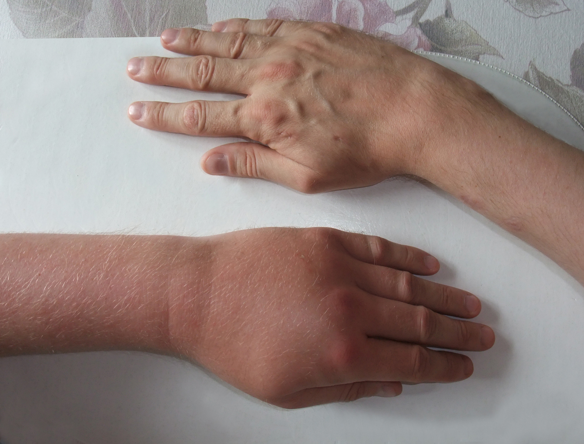 Wespenstich in Hand